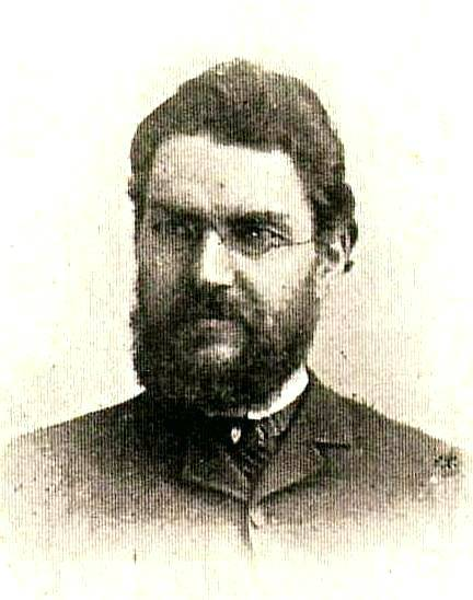 Российский революционер Лазарь Борисович Гольденберг (1846-1916)